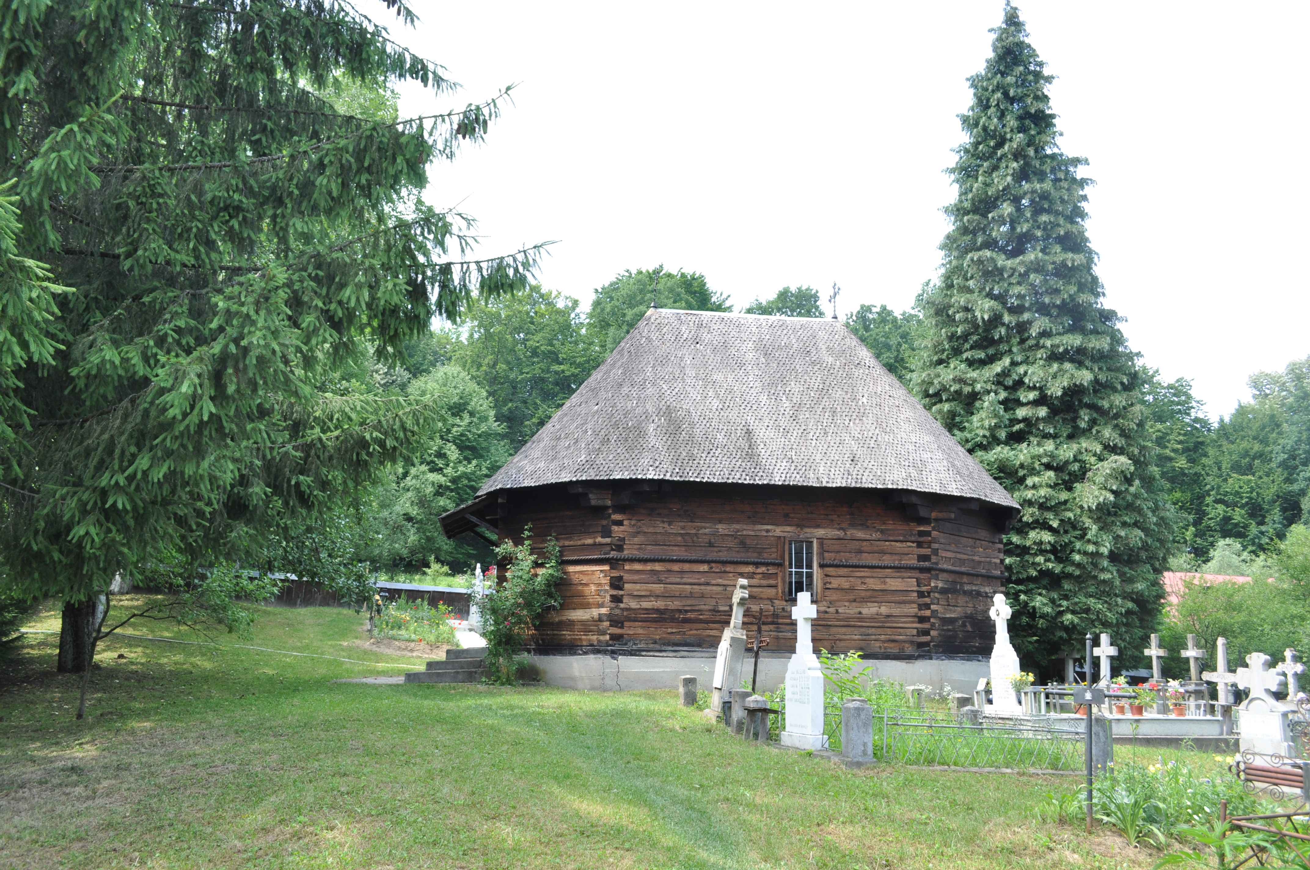 Mănăstirea Bogdana, Bacău